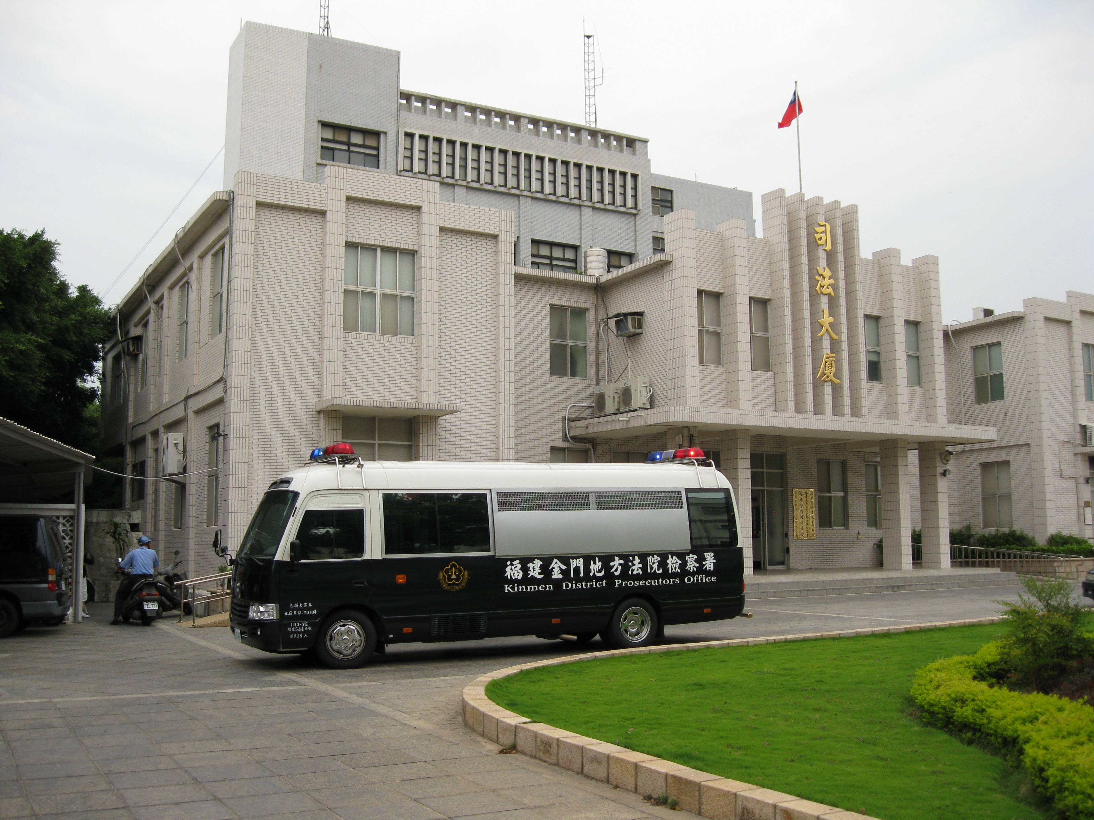 金門司法大廈，位於中華民國福建省金門縣金城鎮民權路178號，是福建金門地方法院現址。